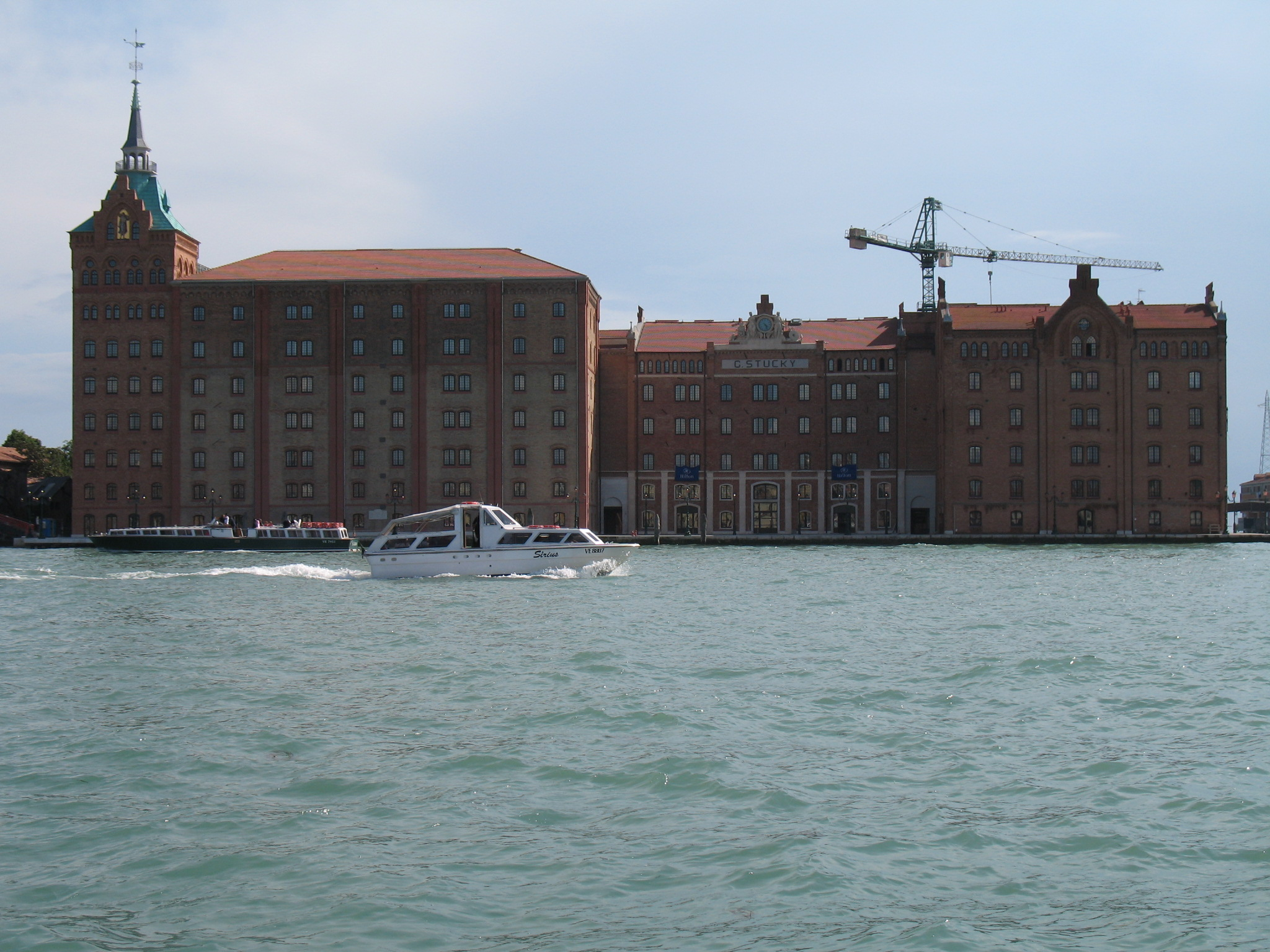 Immagine da Venezia - il Molino Stucky